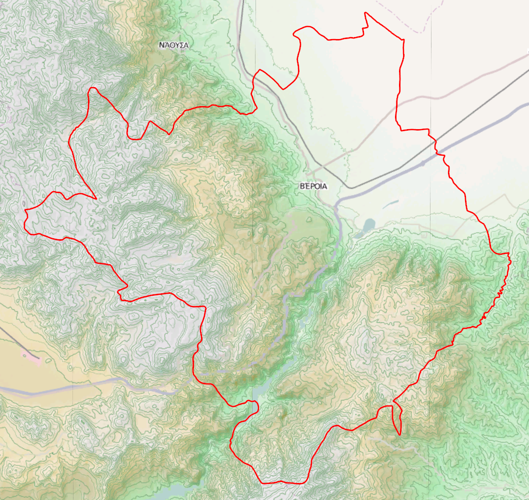 Τοπογραφικός χάρτης του Δήμου Βέροιας